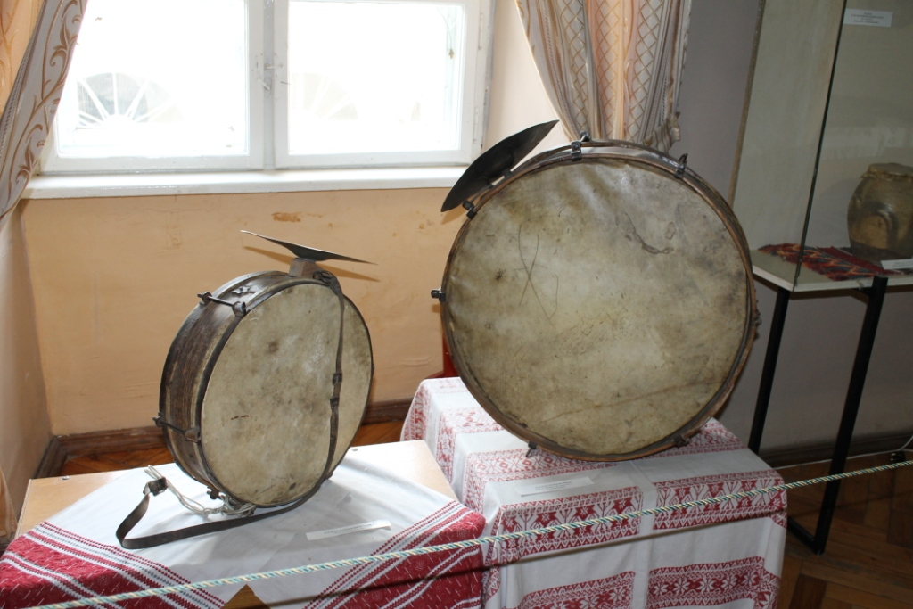 Барабан з тарілкою, українські народні інструменти в музеї музичних інструментів, м. Ужгород